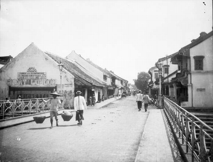 Foto. Een straat in de Chinese wijk nabij de Pasar Baroe, Noordwijk, Batavia.